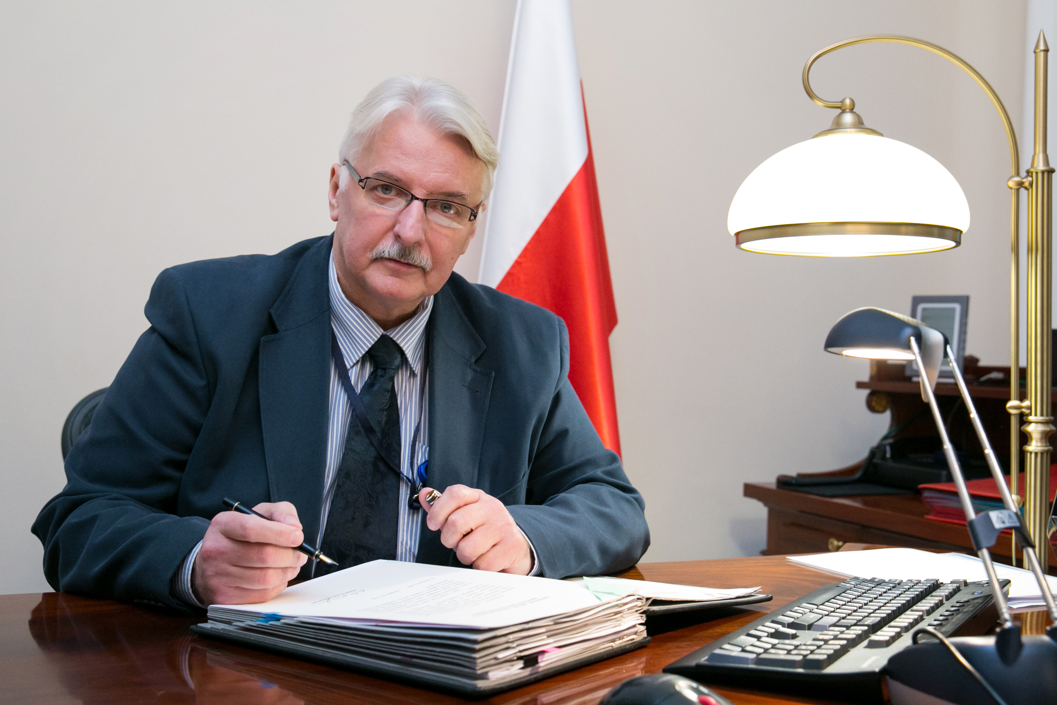 Minister Spraw Zagranicznych Witold Waszczykowski